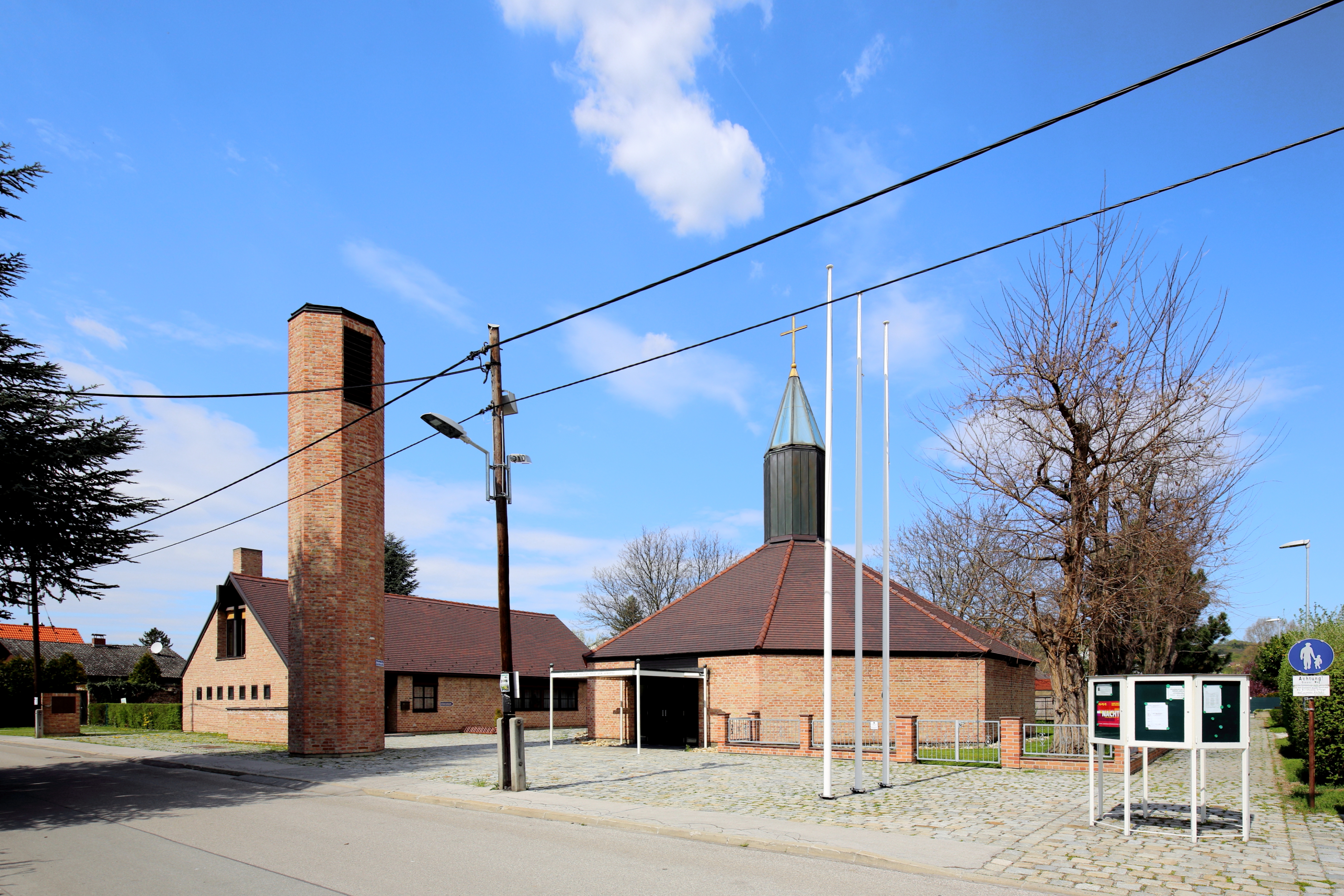 Die katholische Kirche hl. Josef der Arbeiter in Dirnelwiese, ein Ortsteil der niederösterreichischen Marktgemeinde Langenzersdorf. Die Kirche wurde in den Jahren 1982/1983 nach Plänen des Architekten Roland Rainer errichtet.